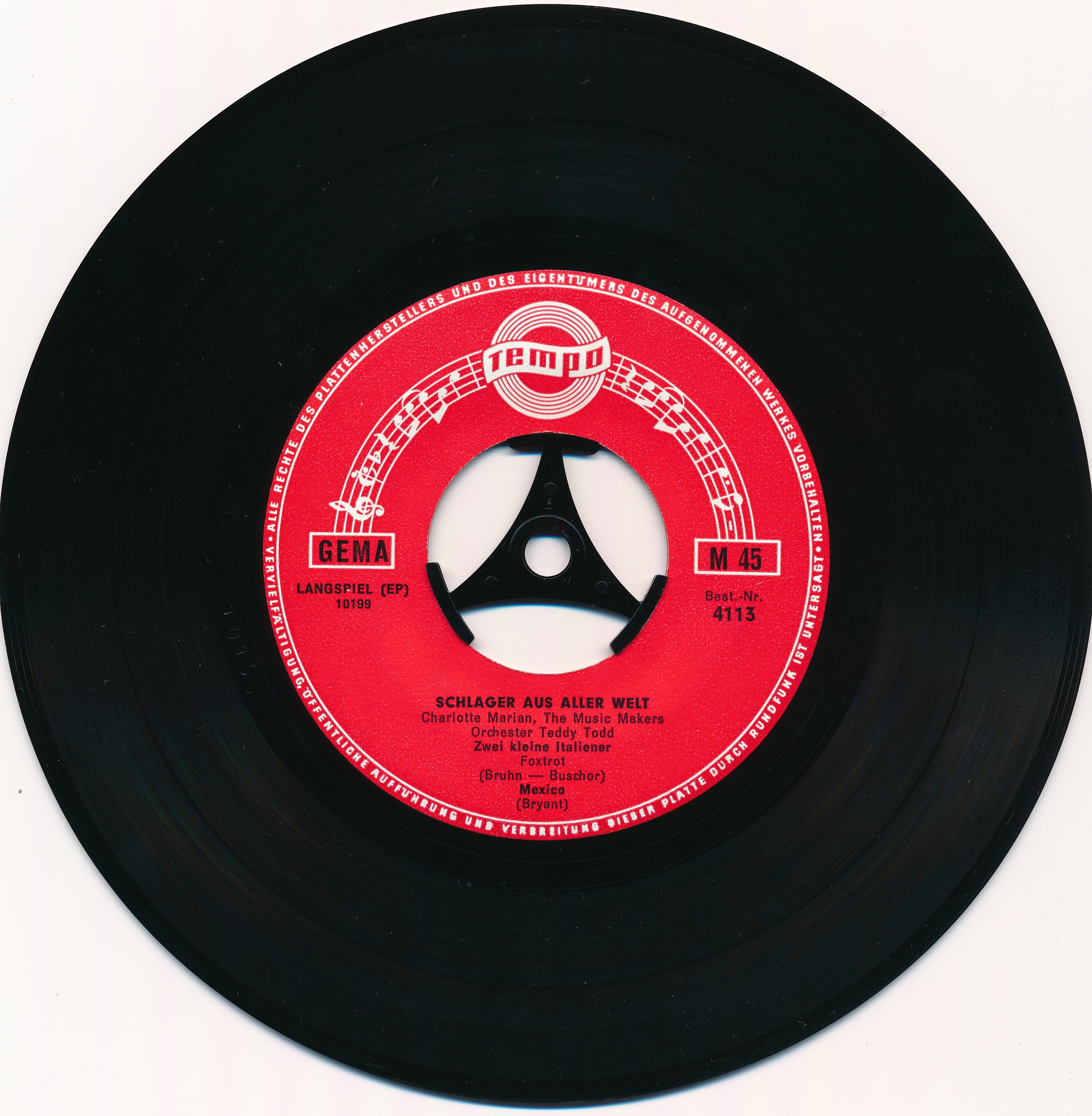 Single-Schallplatte des Schallplattenlabels Tempo